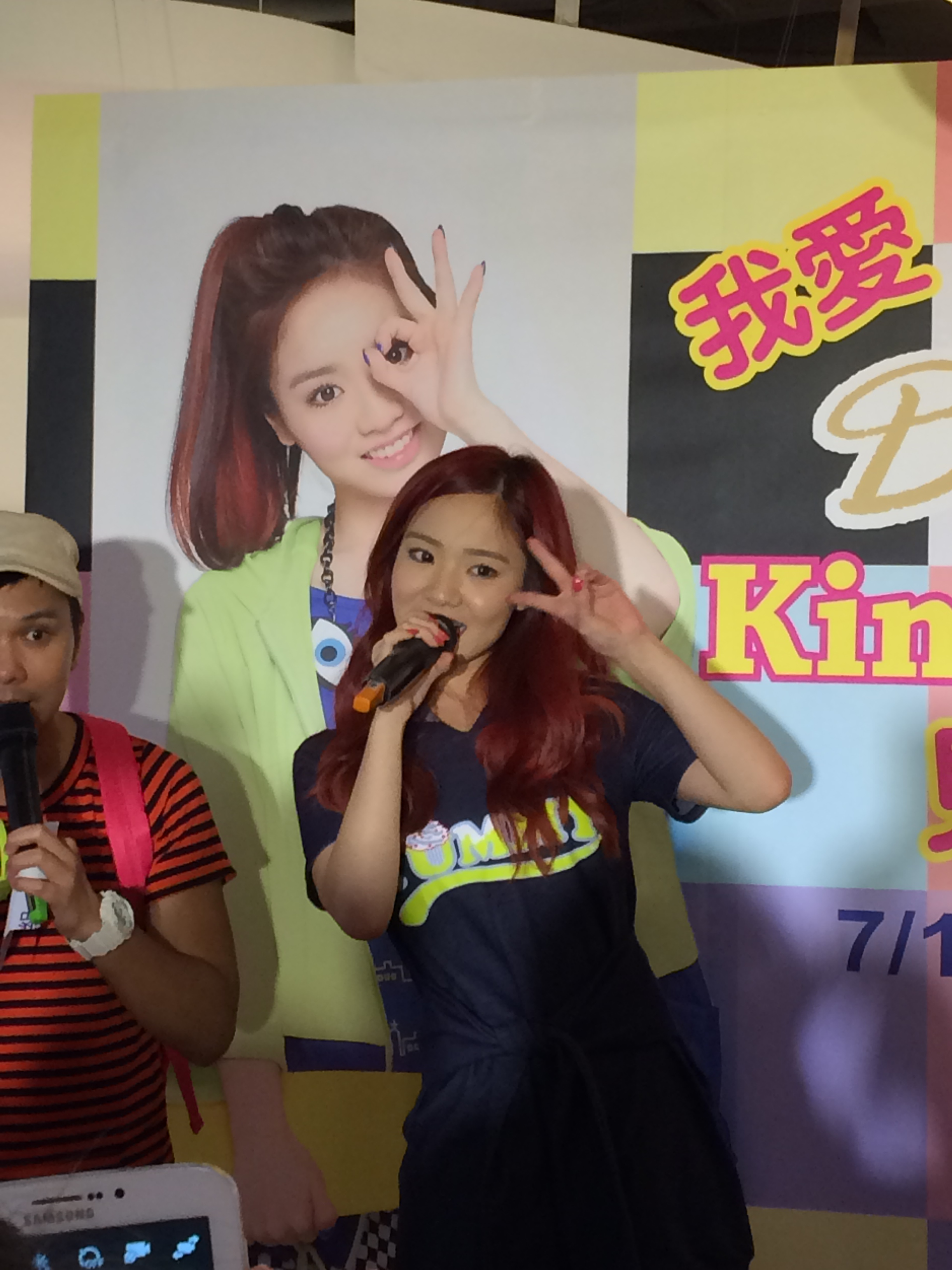 廣三崇光Dailo代言見面會